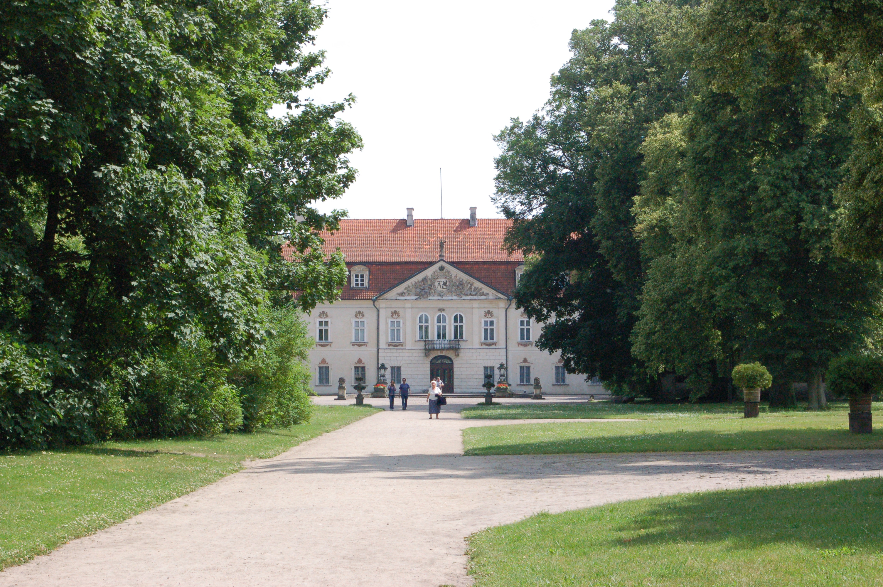 Polen, Nieborów Palast